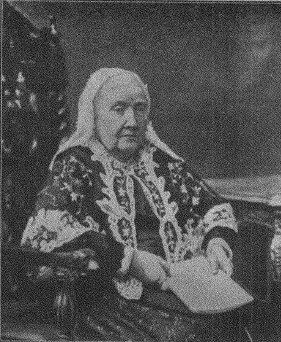 Illustration till artikel "Antis ojämna kamp" i tidskriften Dagny. Bildtexten lyder "Mrs Julia Ward Howe. Den 89-åriga rösträttsförkämpen."